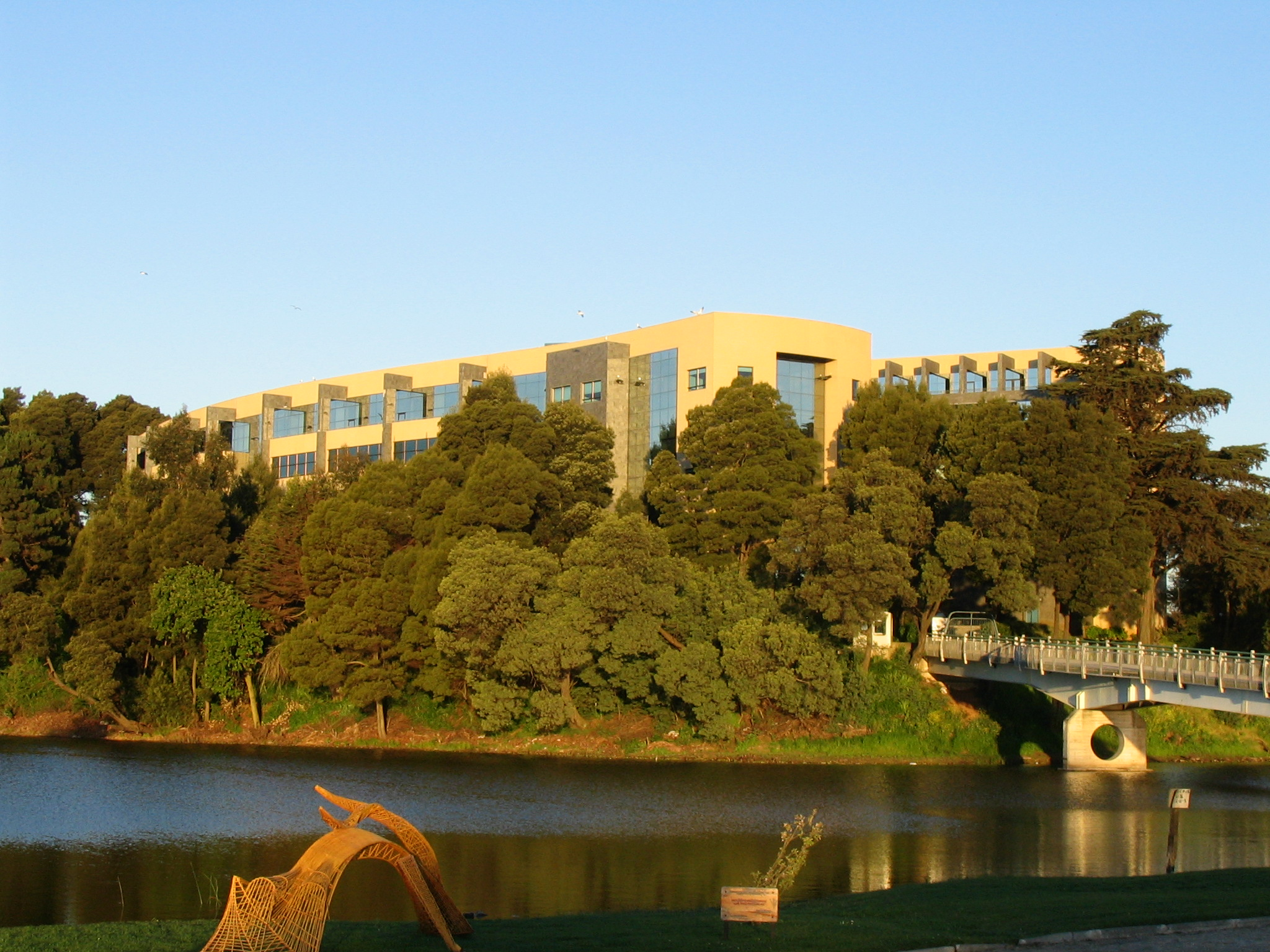 Universidad San Sebastián, ubicada en Concepción, Chile.